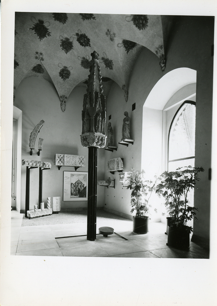 Servizio fotografico : Milano, 1956 / Paolo Monti. - Fototipi: 38 : Positivo b/n, gelatina bromuro d'argento/ carta, provino a contatto da pellicola 10x12. - ((Serie costituita da 38 provini a contatto dei negativi identificati con i nn.: 23, 41, 102, 103, 104, 105, 127, 129, 130, 131, 133, 136, 137, 138, 139, 140, 141, 142, 143, 144, 145, 146, 148, 149, 150, 151, 152, 154, 155, 156, 157, 159, 165, 218, 219, 229, 236, 253 (secondo altra numerazione manoscritta al verso dei provini). - La suddetta serie è contenuta nella scatola dei contatti identificata con il n.144; sul coperchio iscrizione didascalica manoscritta a pennarello nero: "Contatti 7c". - Occasione: Documentazione del riordino e sistemazione dei Musei del Castello e per la pubblicazione: Belgiojso L., Peressutti E., Rogers E.N., "Il riordino dei Musei del Castello Sforzesco di Milano", in "Casabella", n. 211, 1956. - Fonte: Rubrica di Paolo Monti: Archivio 10x12 (ultimi numerati) - dal G1 al (s.d.), presso Archivio Paolo Monti. - Fonte: Monografia di Belgiojoso L. Peressutti E., Rogers E.N.: Il riordino dei Musei del Castello Sforzesco di Milano, in Casabella, n. 211 (1956)